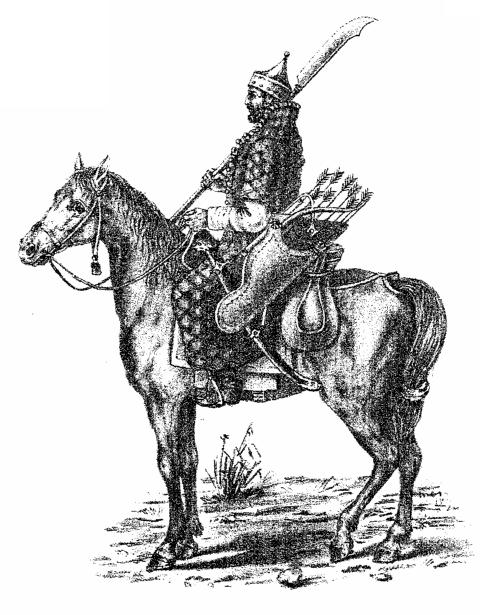 Всадник в тегиляе с совней, с рисунка Висковатова.